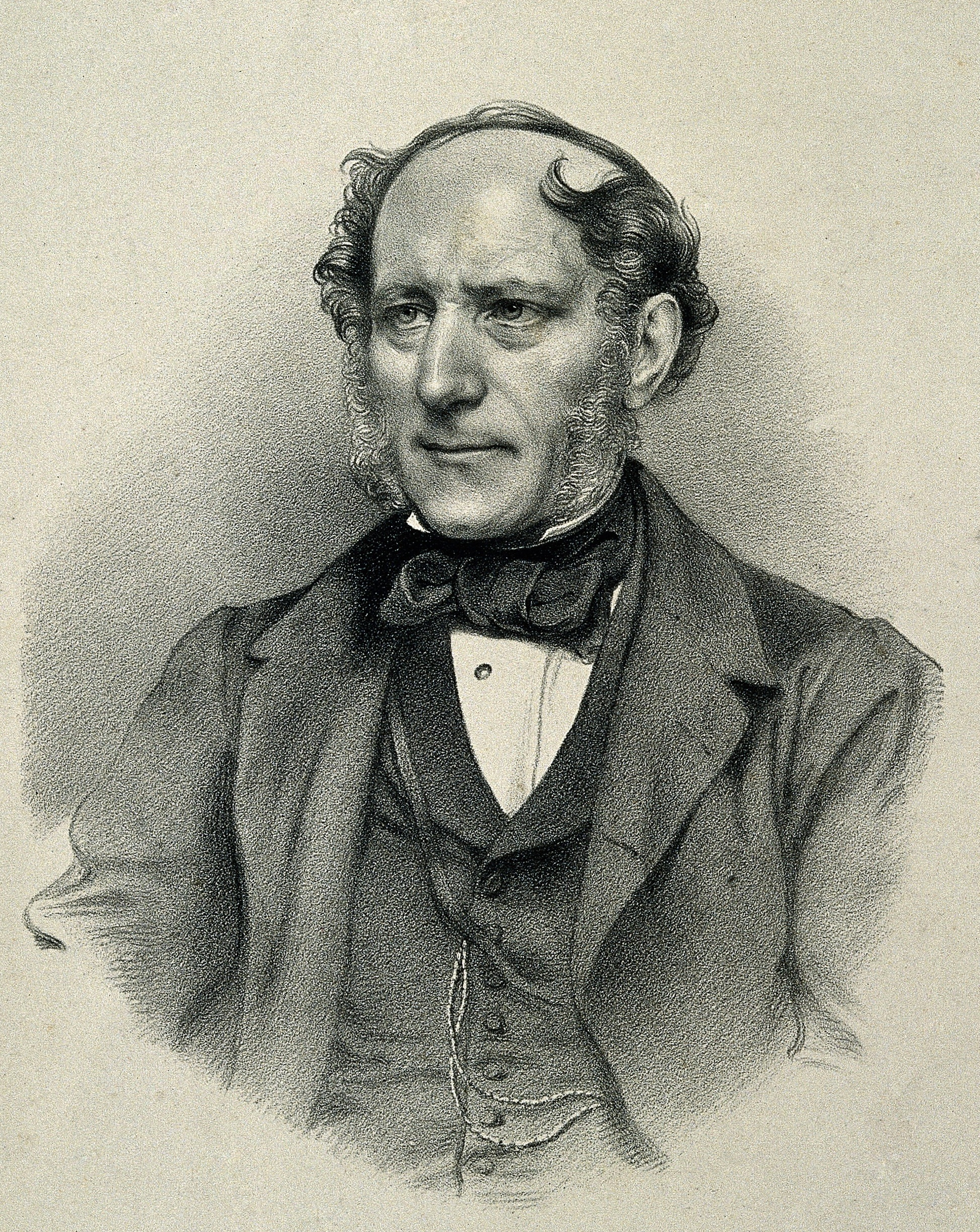 Genre/Technique: Portrait prints. Lithographs. Subject name: Davis, Joseph Barnard, 1801-1881.